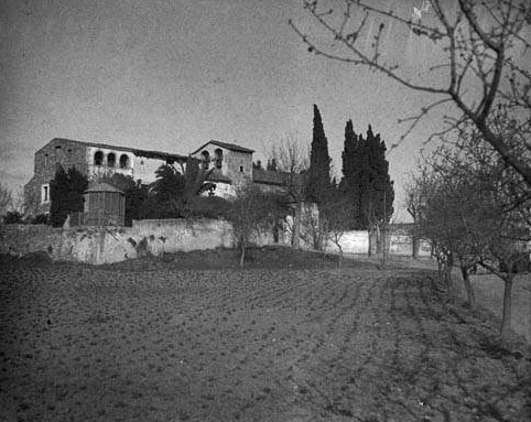 L'església antiga de Sant Genís de Plegamans l'any 1924. O sigui 12 anys abans de ser cremada i pràcticament destruïda el 1936 en començar la guerra civil espanyola.